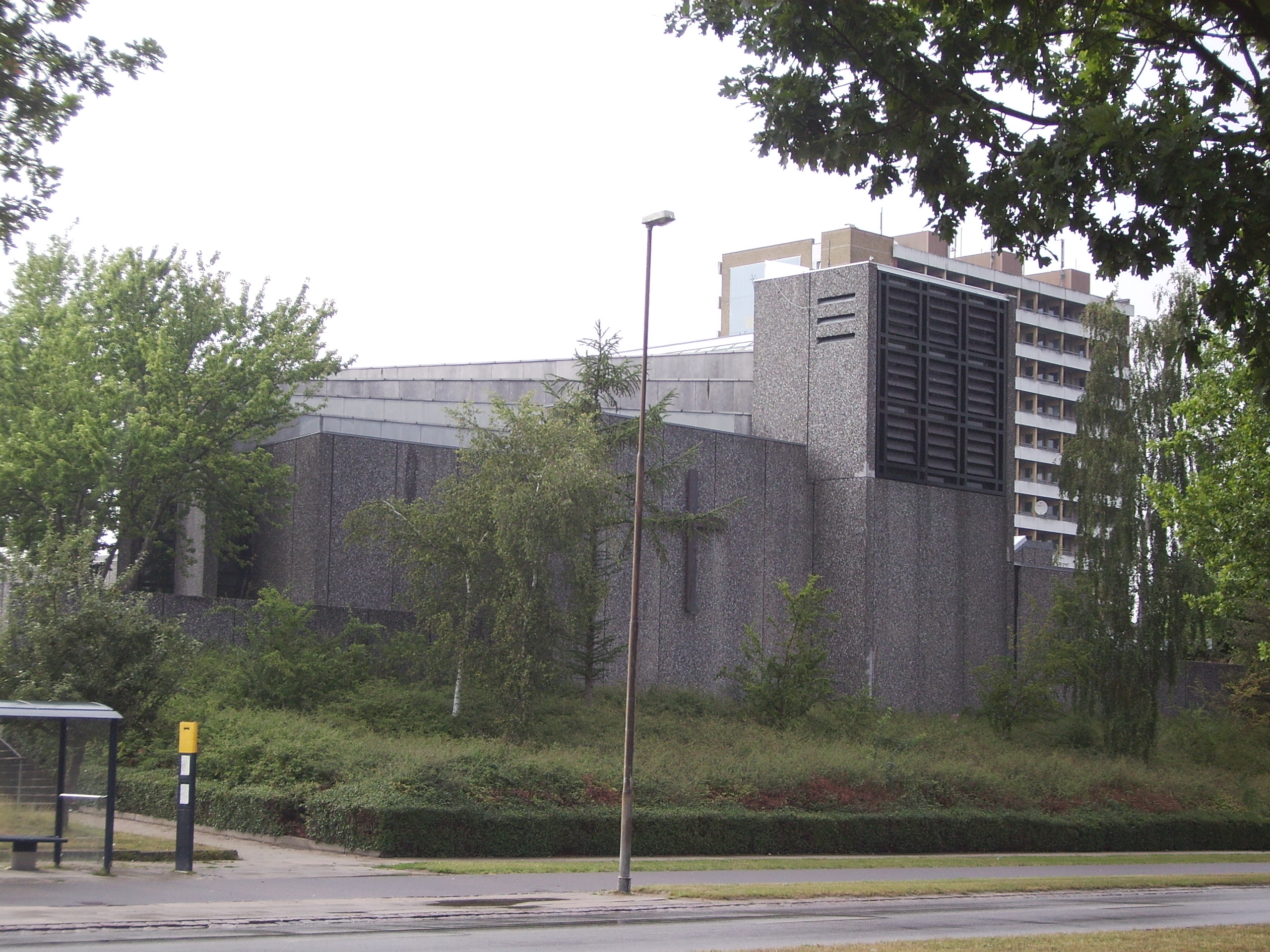 Vollsmose Kirke, Vollsmose Sogn, Odense Herred, Odense Amt, Denmark (Danish Church)